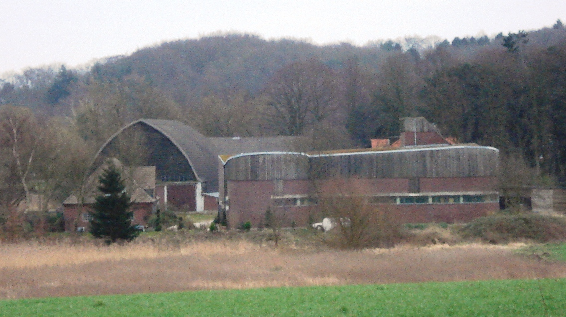 Gut Garkau aus Nordwest